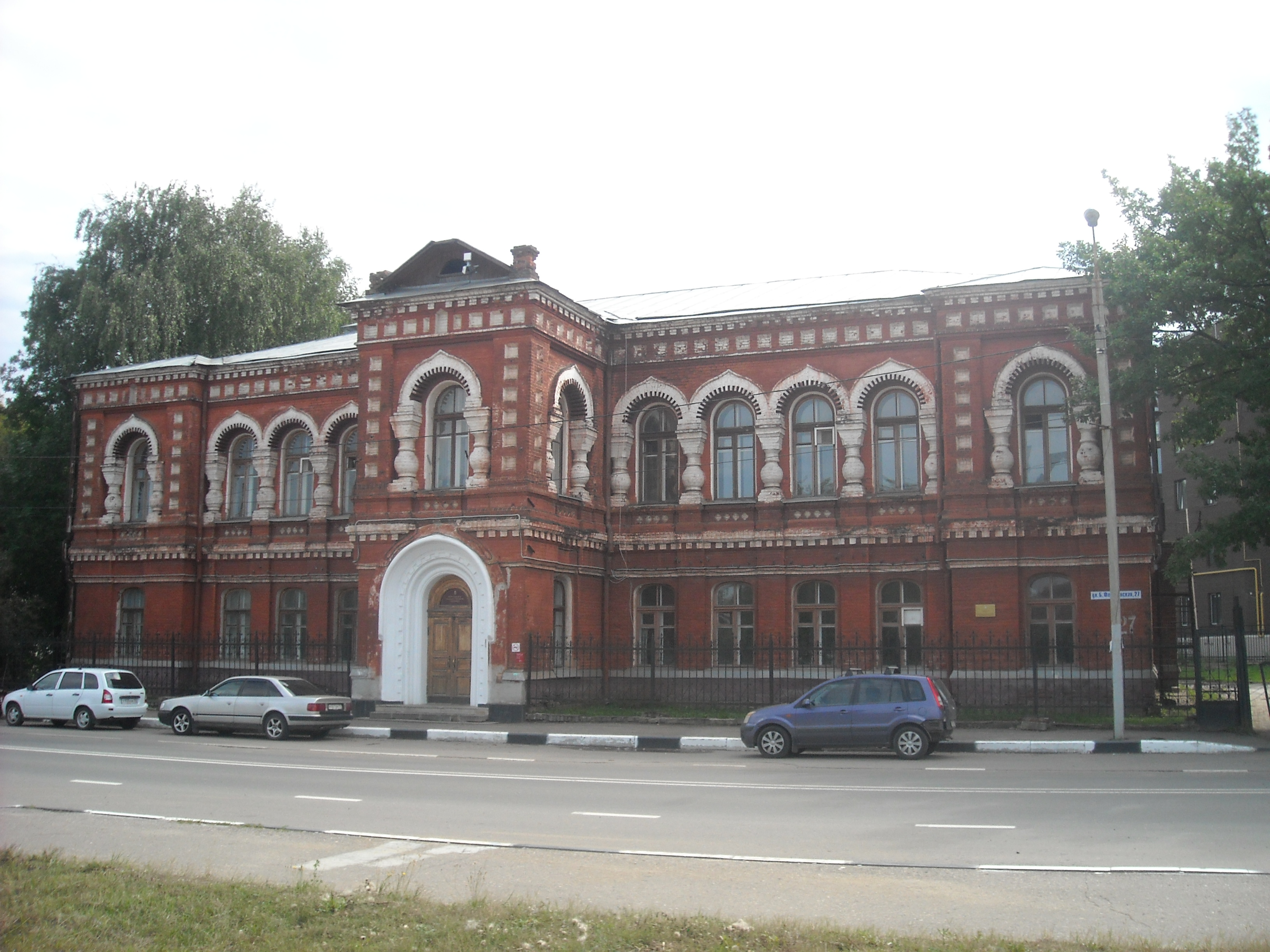 Дом Градусова: улица Большая Федоровская, 27 (Ярославского), Ярославль, Ярославская область